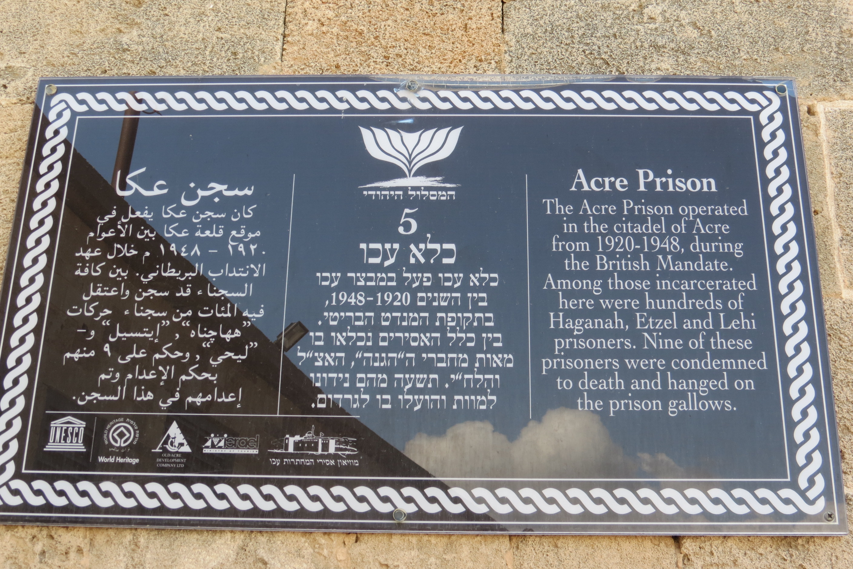 Tour of Acco Acre Israel עכו